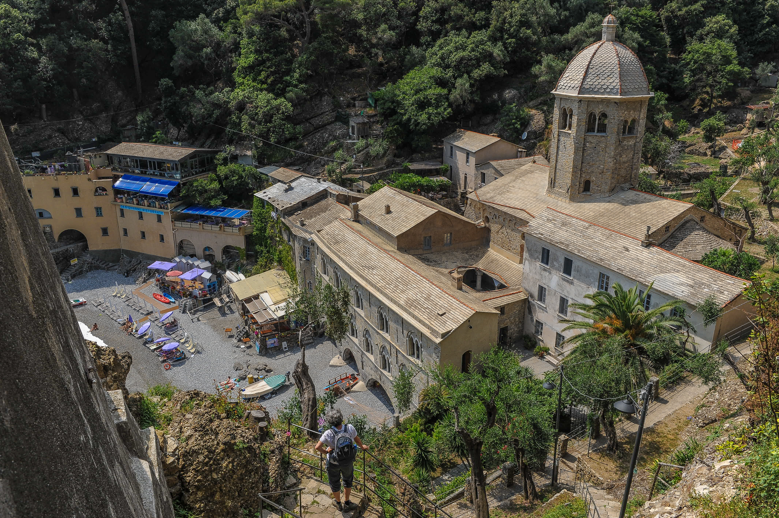 San Fruttuoso, Camogli, Liguria